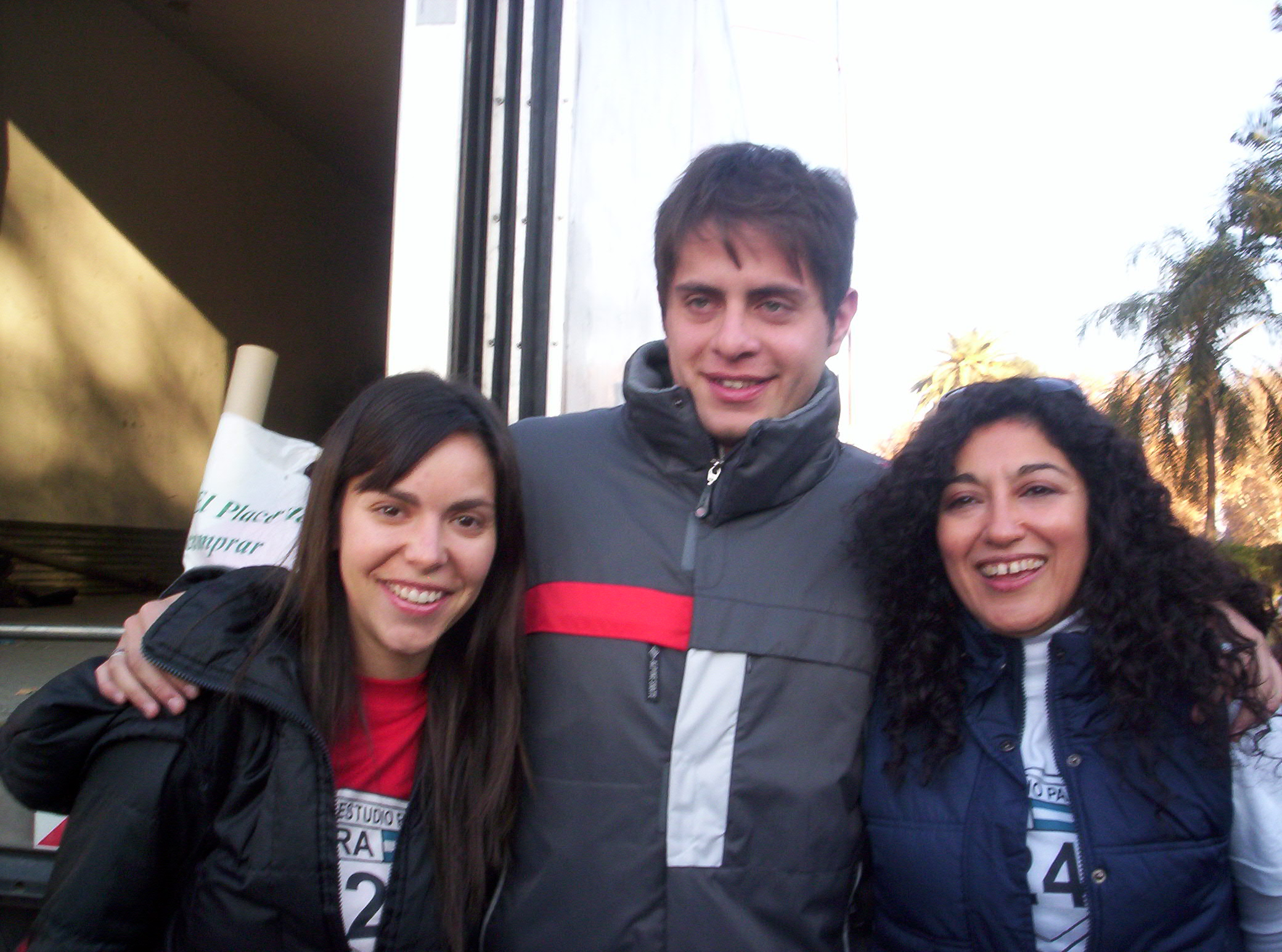 Fotografía que muestra a Paula Velasco, Emiliano Pascuareli y Rosi Amin, los representantes de Mendoza, San Luis y San Juan del programa de canal 7 Estudio País 24, en su paso por la ciudad de San Juan, con el motivo de la ruta de la solidaridad